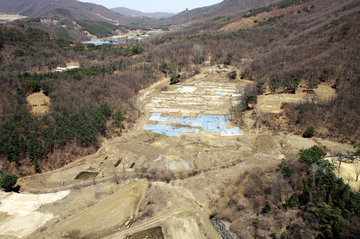 사적 제464호 파주 혜음원지 (坡州 惠蔭院址)